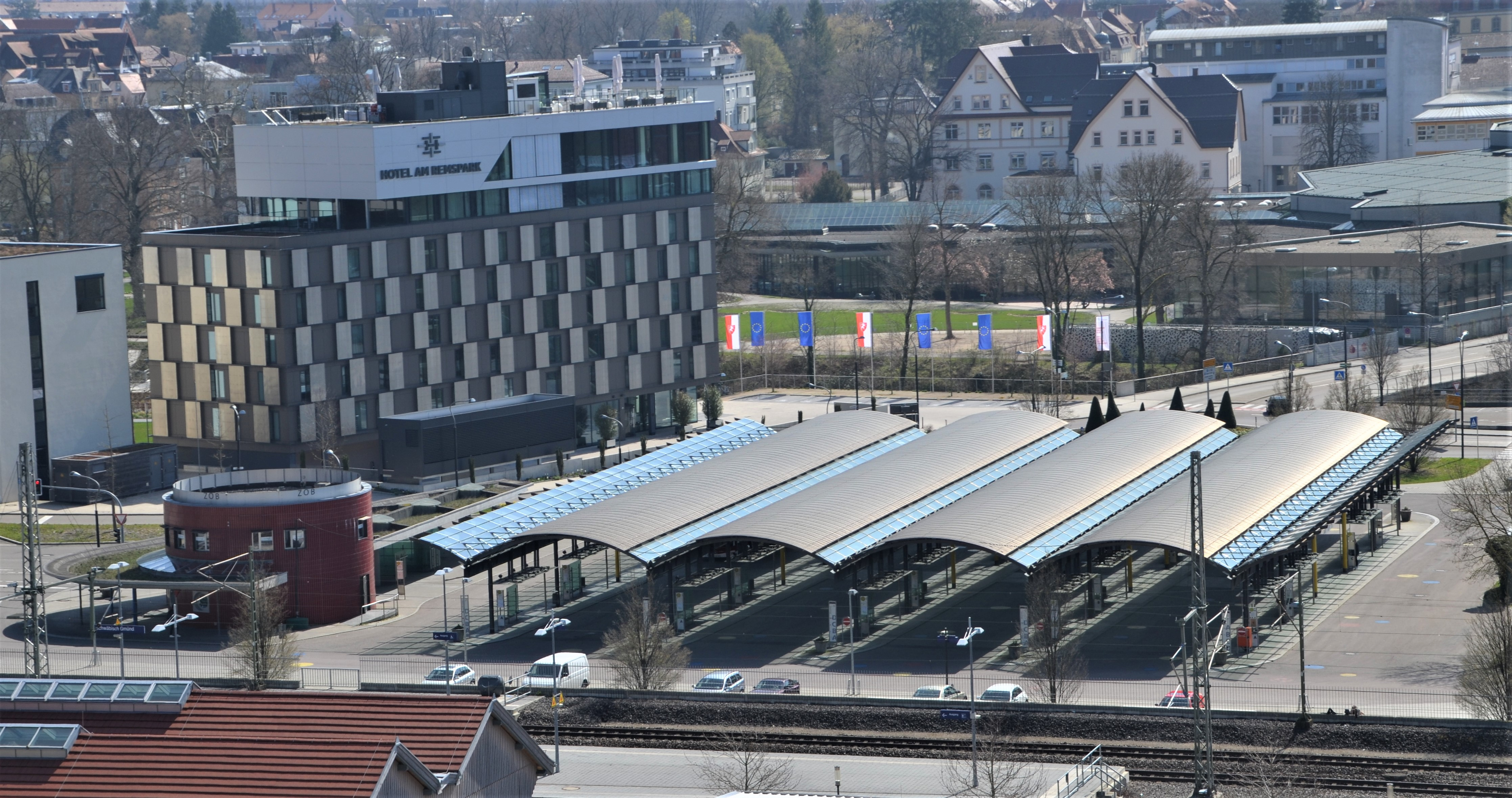 Zentraler Omnibusbahnhof (ZOB) in Schwäbisch Gmünd, vom St. Salvator aufgenommen